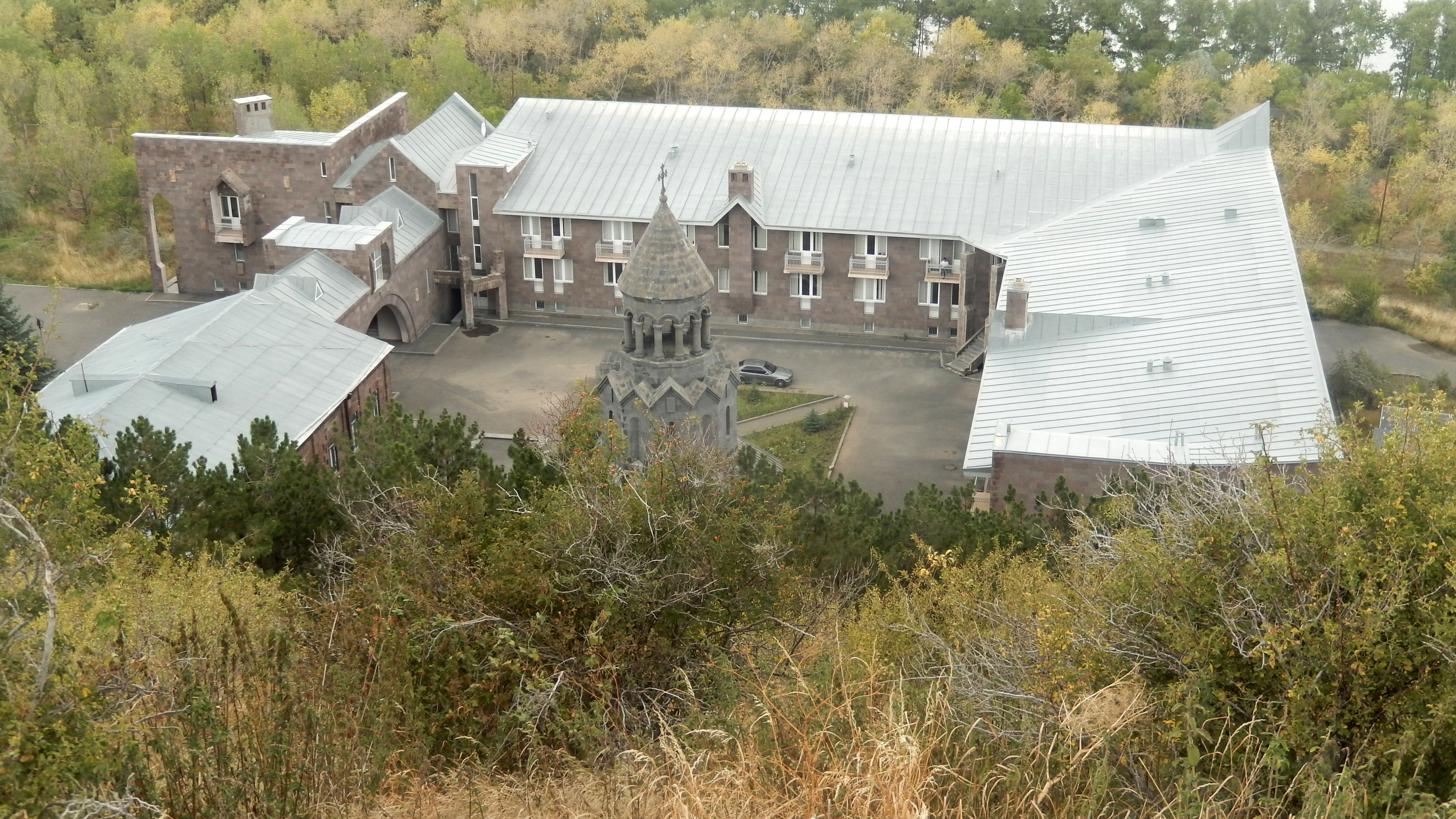 Սևանի Ճեմարանի շենք 4/18.4